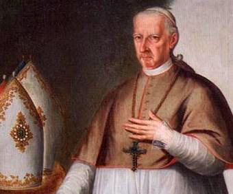 José de Cuero y Caicedo, Obispo de la ciudad de Quito entre 1802 y 1815. Vivió la revolución quiteña de 1809 y fue Presidente de la Segunda Junta de Gobierno de la misma. Óleo sobre lienzo que se encuentra en la Sala Capitular de la Catedral Primada de Quito, de autor desconocido (siglo XIX).